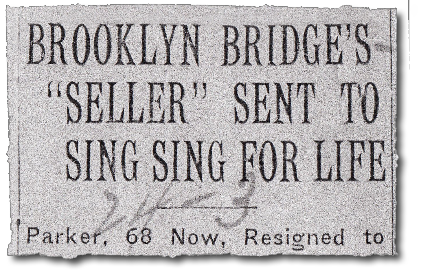 Lebenslang Sing Sing für George C. Parker